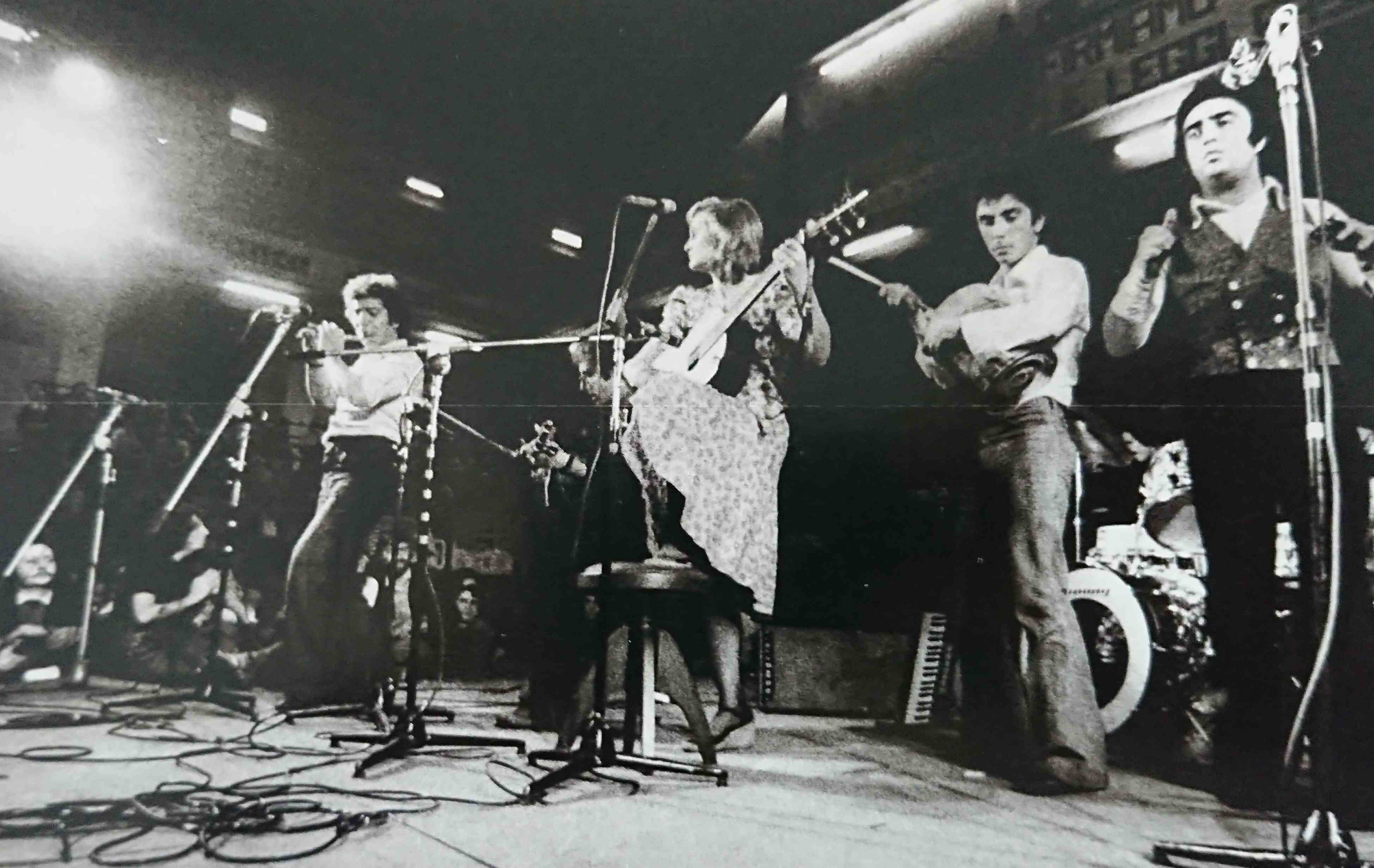 Un'esibizione della Nuova Compagnia di Canto Popolare nel 1976